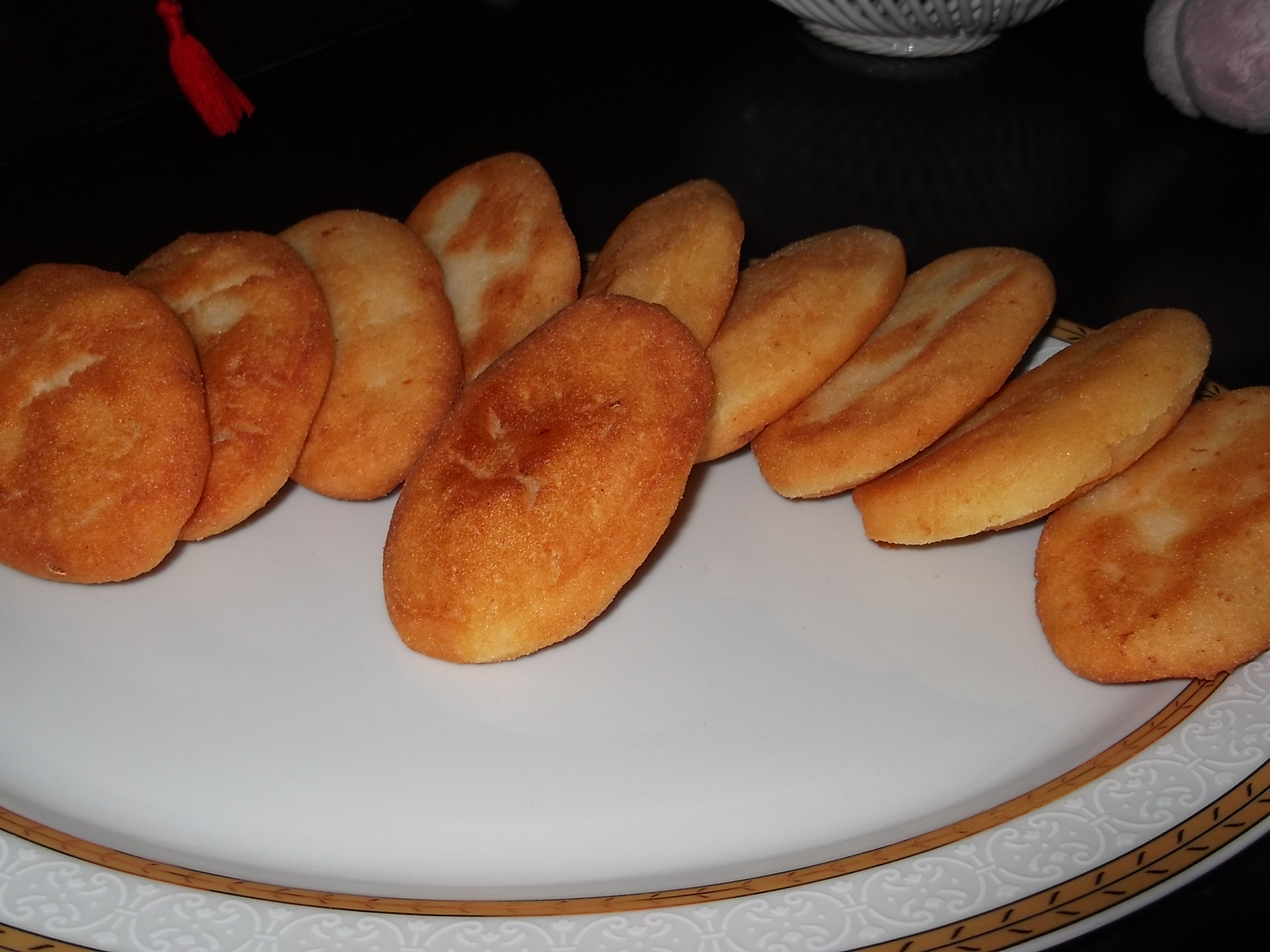 Mchadis, petits pains de farine de maïs.